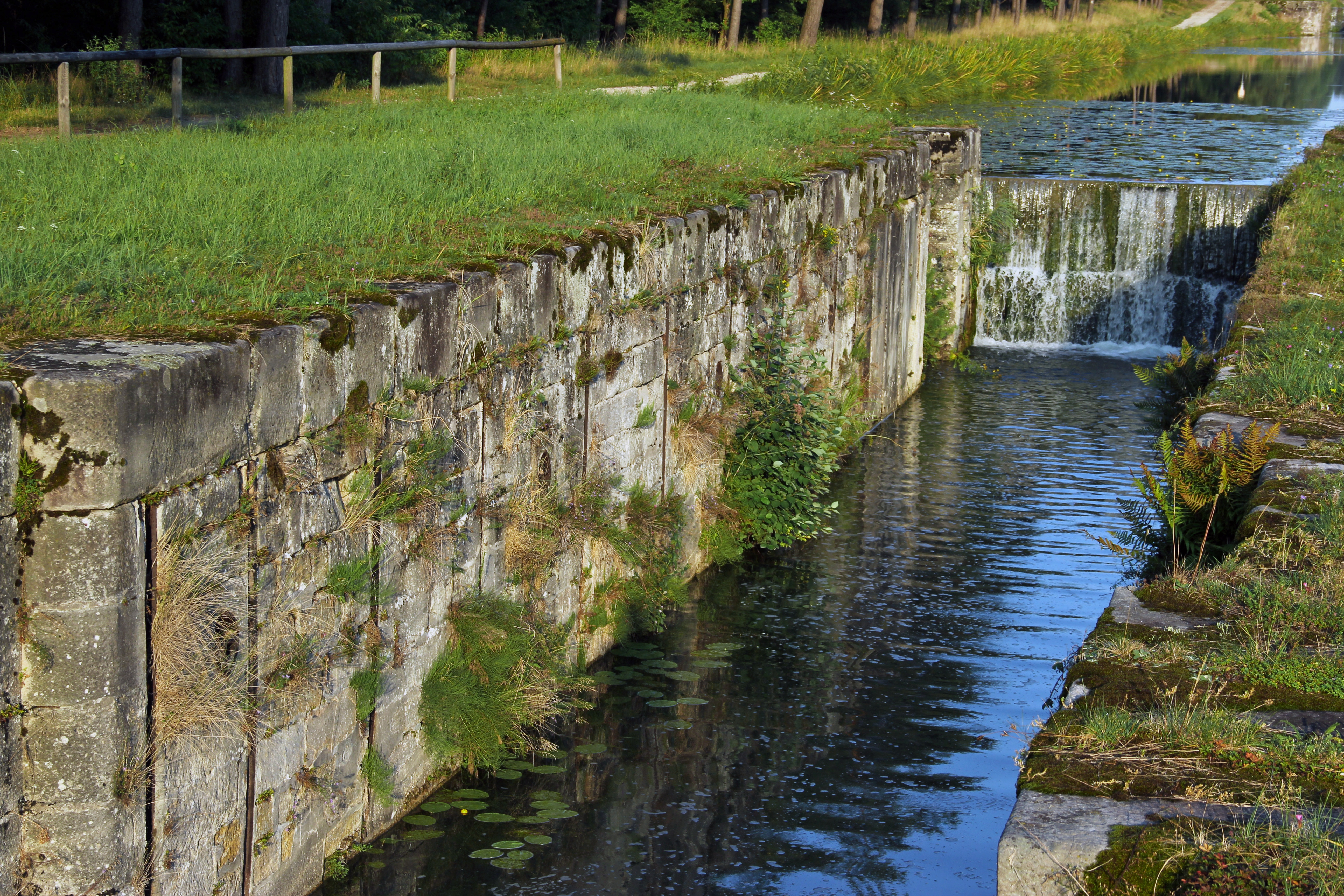 Schleuse 54, Schleusenkammer, Ludwig-Donau-Main-Kanal